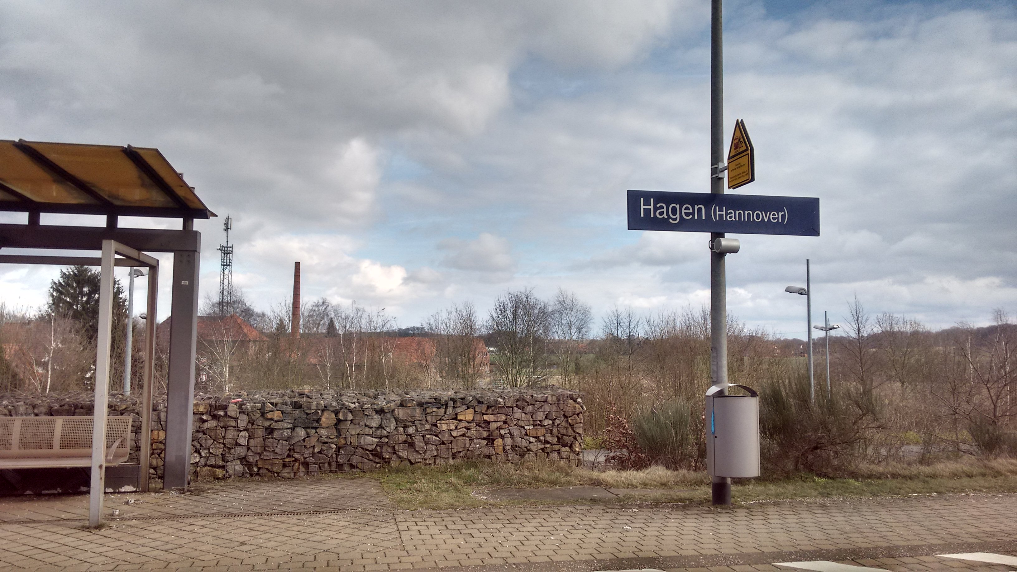 Bahnhof Hagen(Hannover) der S-Bahn Hannover, Taken on 5 March 2017